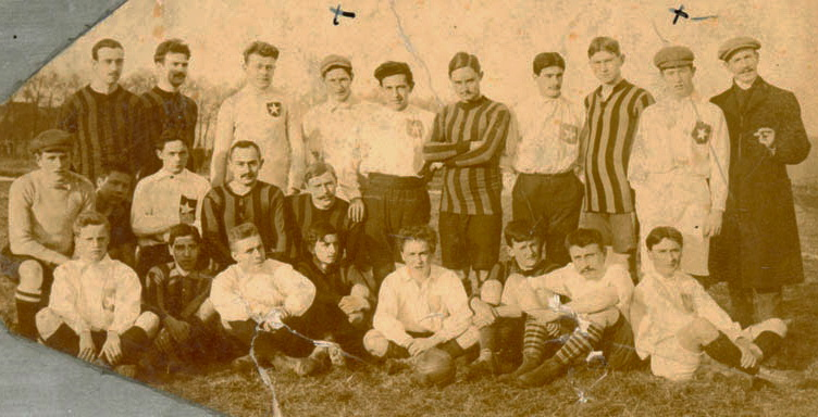 Groepsfoto voorafgaand aan een wedstrijd tussen MFC (later MVV) Maastricht en Alemannia Aachen in het Stadion De Boschpoort in Maastricht, 1907. Fotocollectie RHCL Maastricht, GAM 5671.